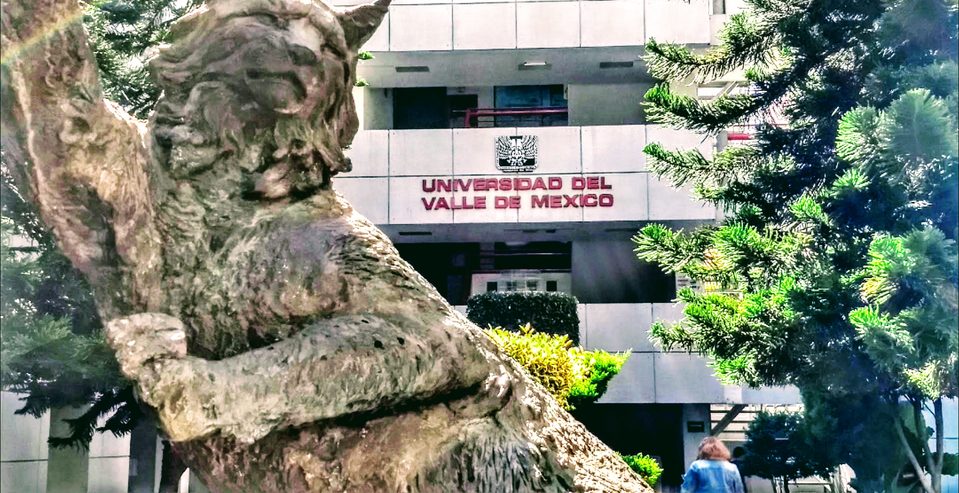 Es la foto de la escultura del lince la uvm tlalpan.